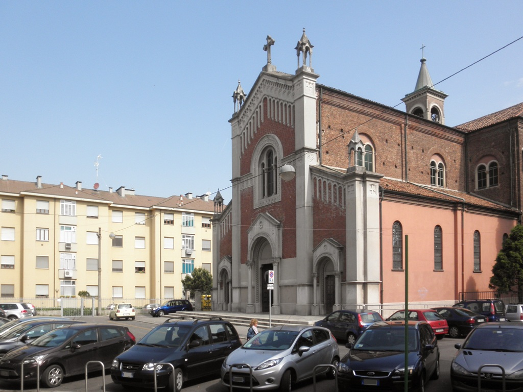 Chiesa parrocchiale della Sacra Famiglia in Rogoredo a Milano.